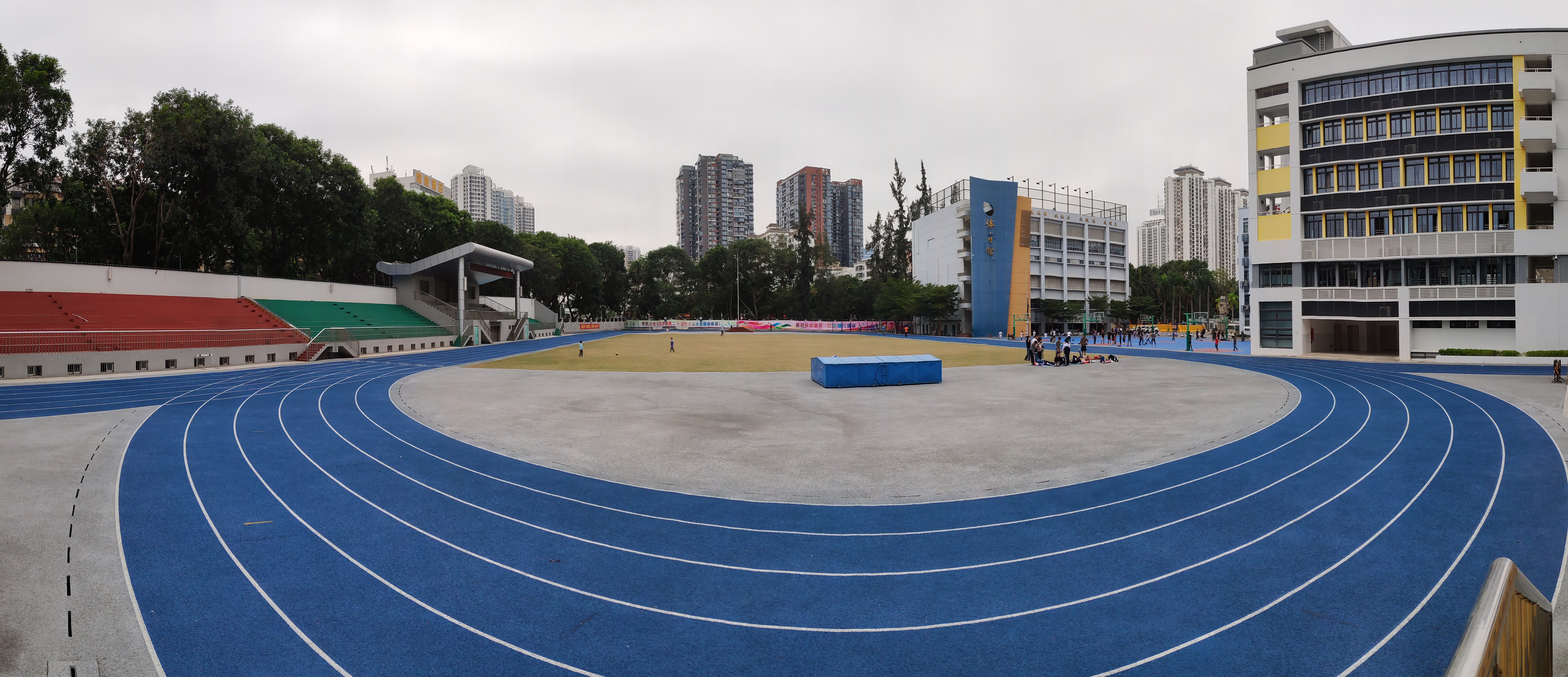 石厦学校运动场全景